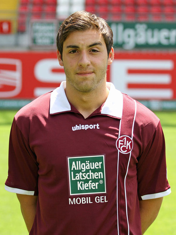 Thanos Petsos, Fußballspieler